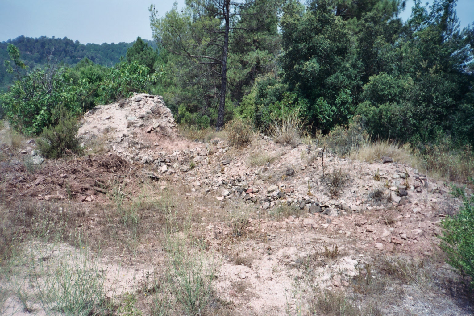 L'Otzetó (Monistrol de Calders, Moianès)